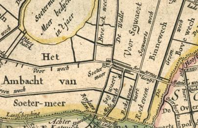 Zoetermeer, Rijnland amstelland atlasmaior